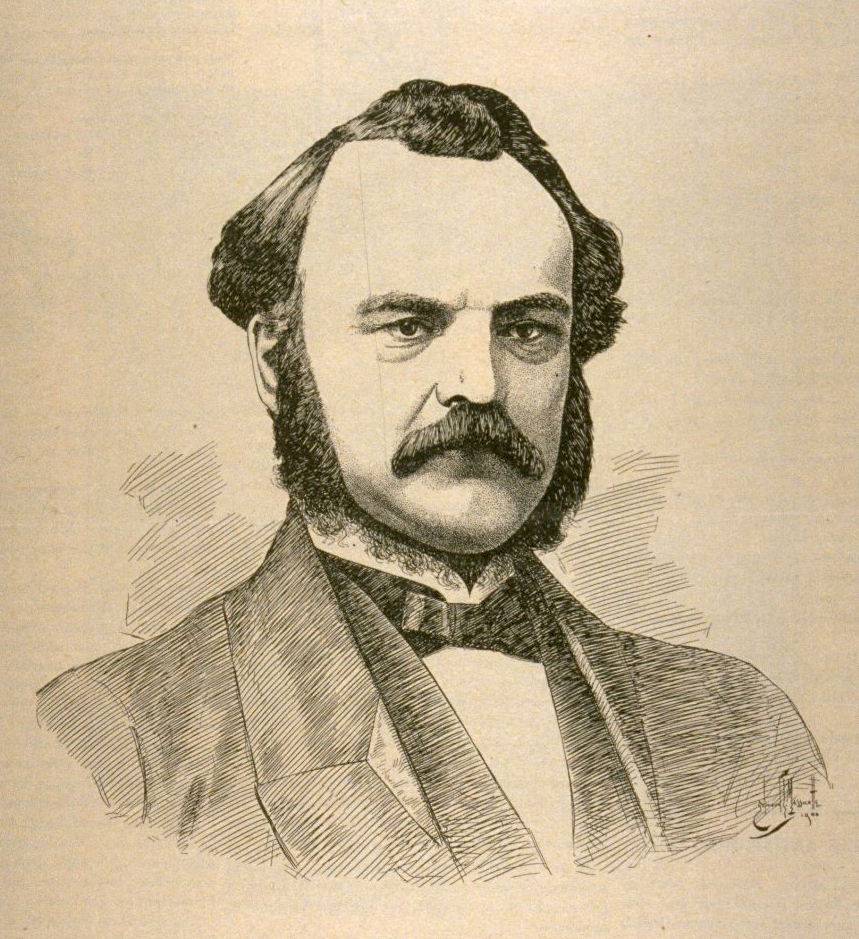 Portrait de l'écrivain Antoine Gérin-Lajoie